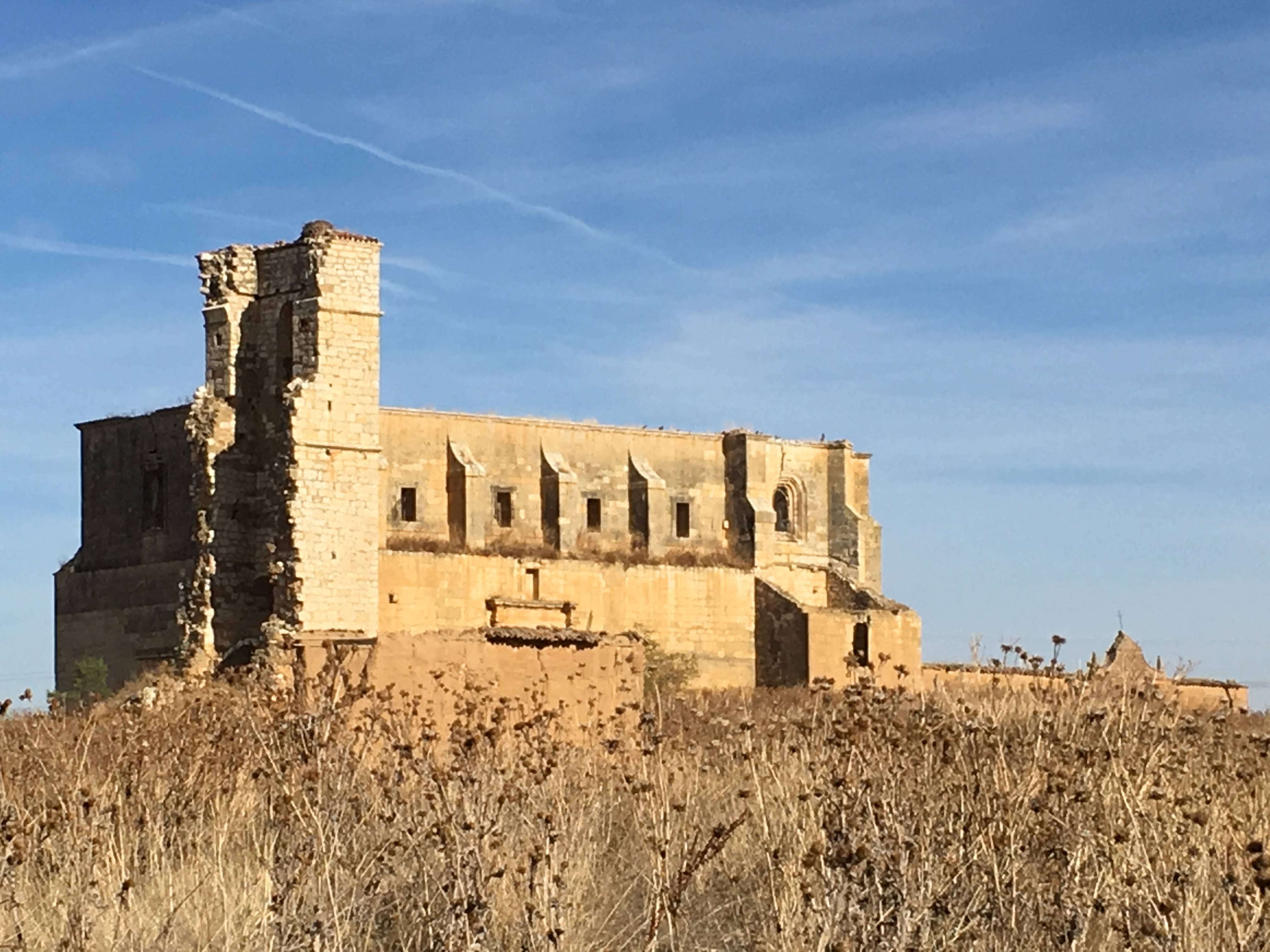 Villaesper Milenario